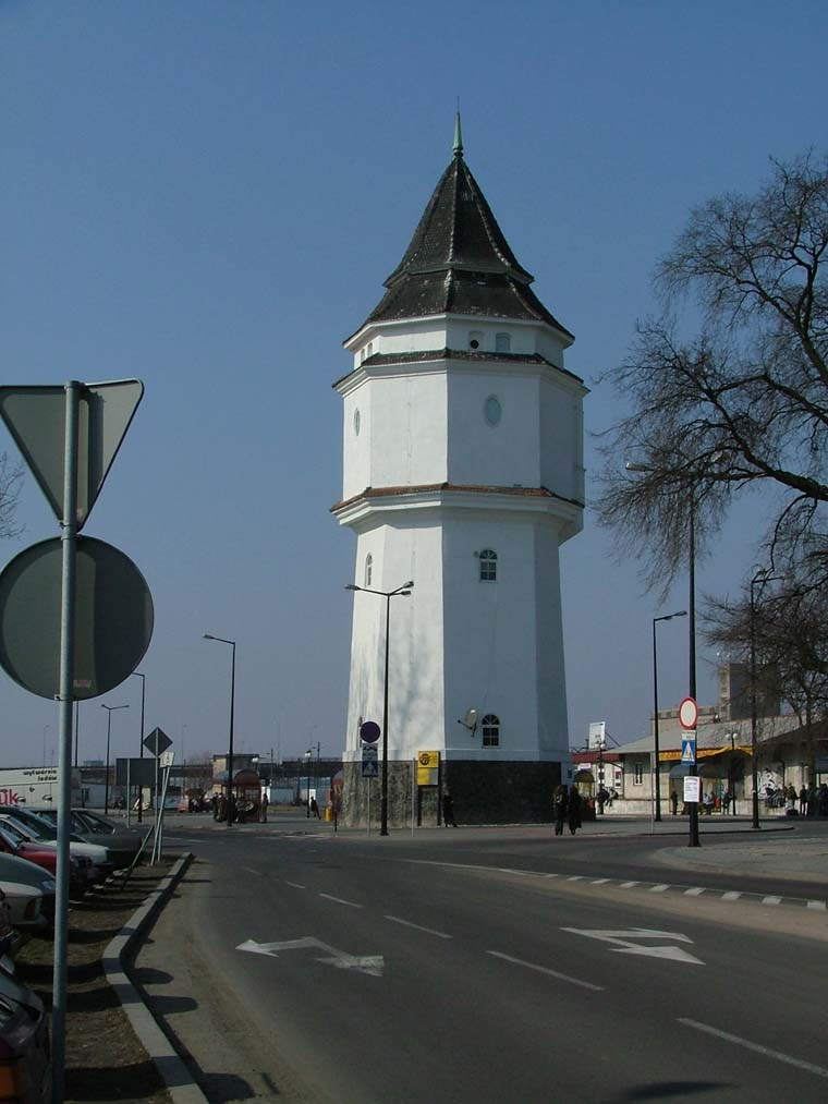 Konin - wieża ciśnień (wodna) - 2006.